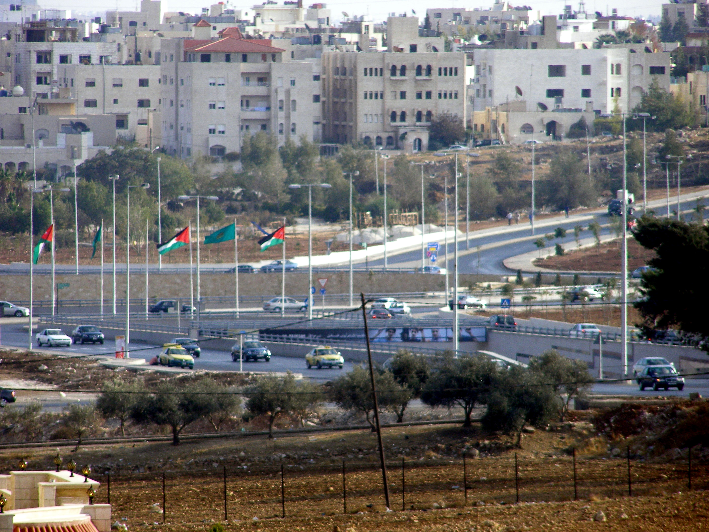 Amman Streets